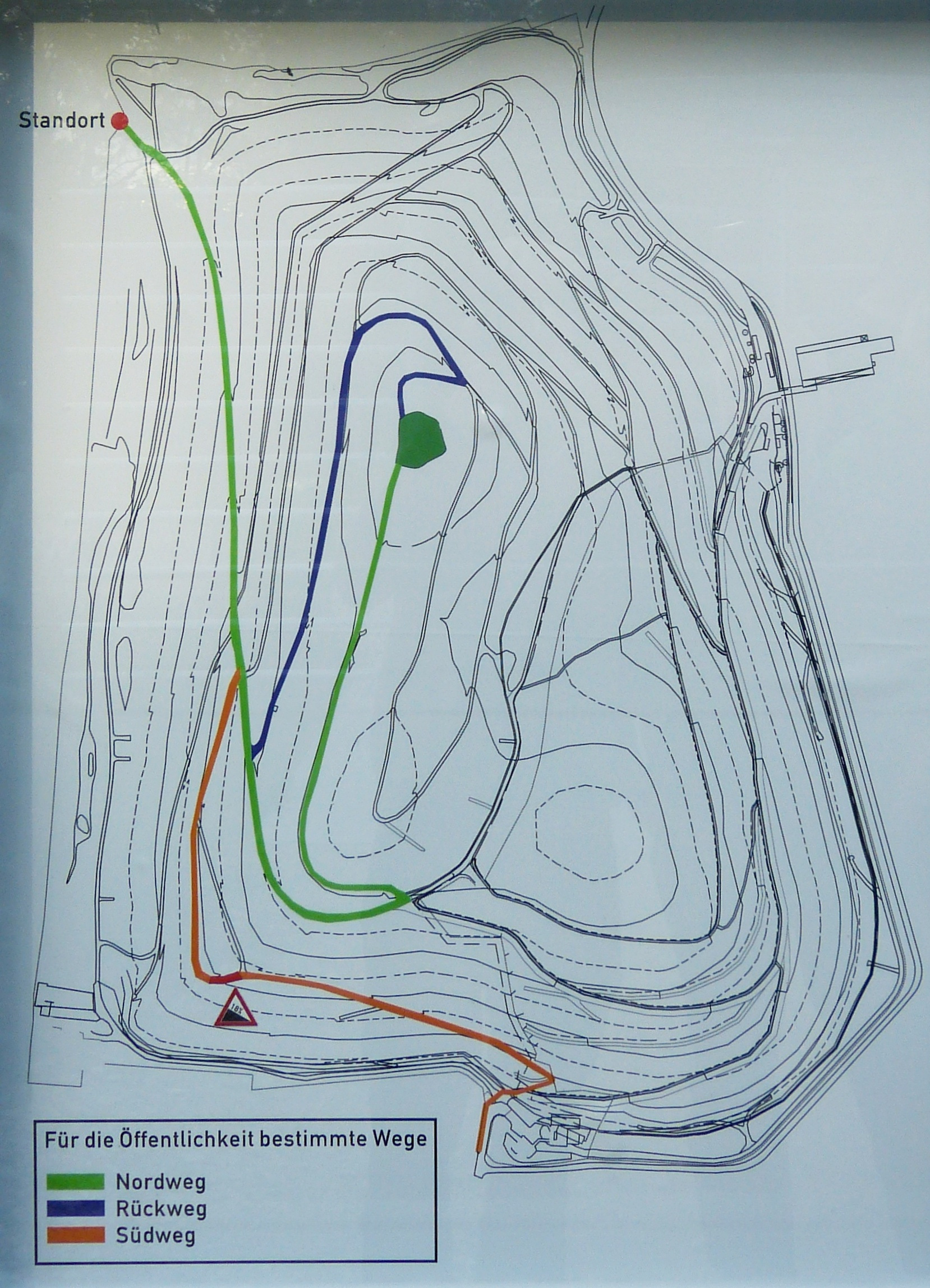 Augsburger Müllberg: Plan mit den Wanderwegen